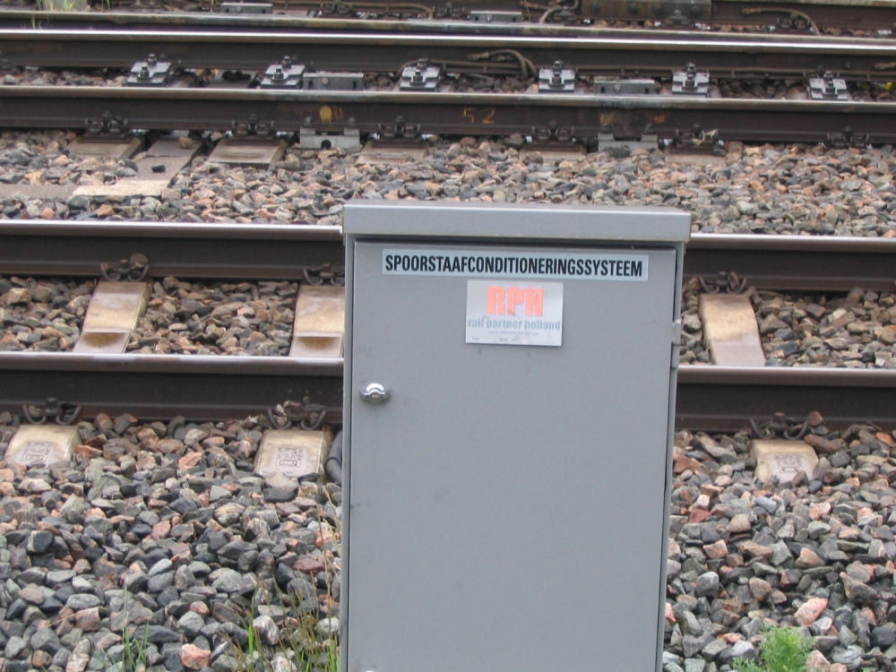 Spoorstaafconditioneringssysteem